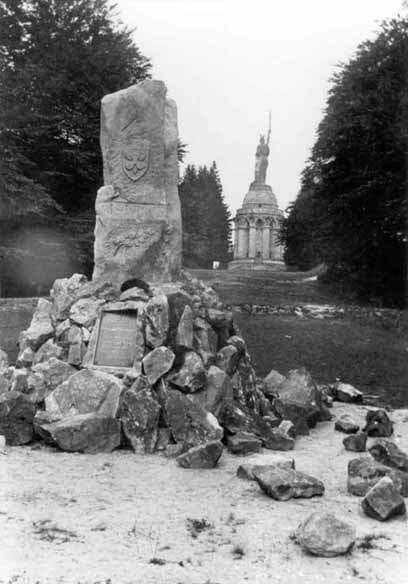 Der Bismarckstein am Hermannsdenkmal 1920 (Detmold, Ortsteil Hiddesen), Photographie. Bildarchiv Detmold, Negativnummer 184